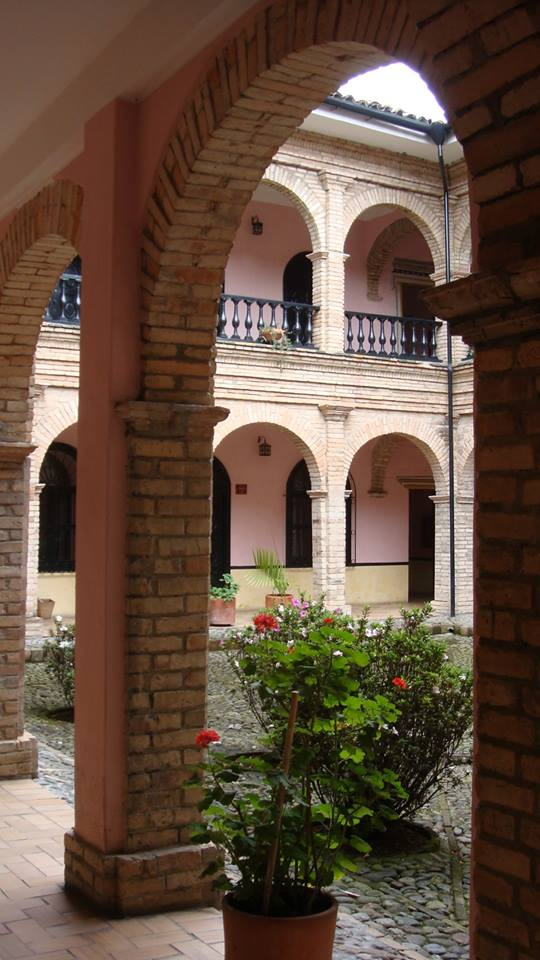 Patio interior de la Casa Torres Tenorio - Facultad de Artes de la Universidad del Cauca